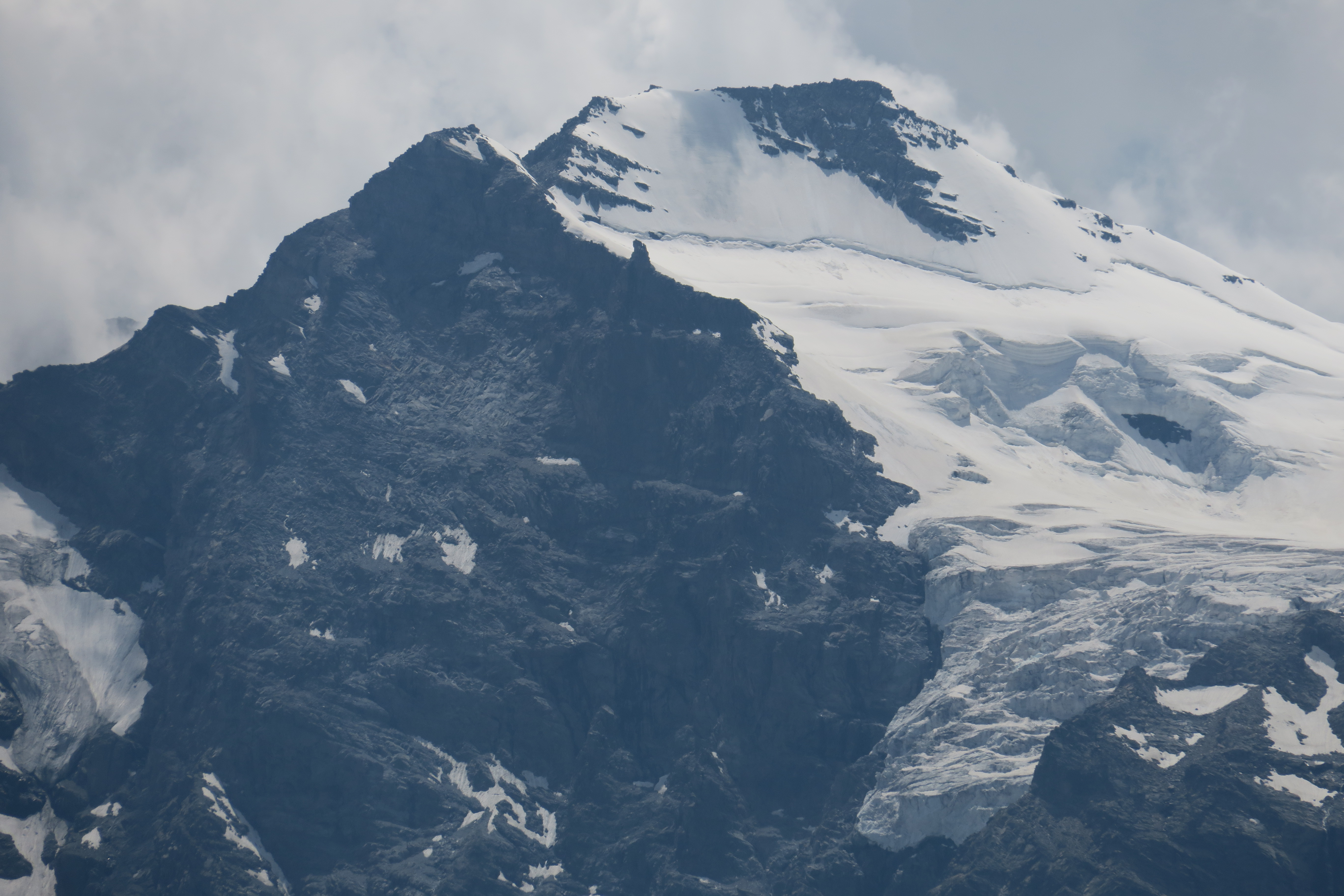 Gran Paradiso This is a photo of a monument which is part of cultural heritage of Italy.